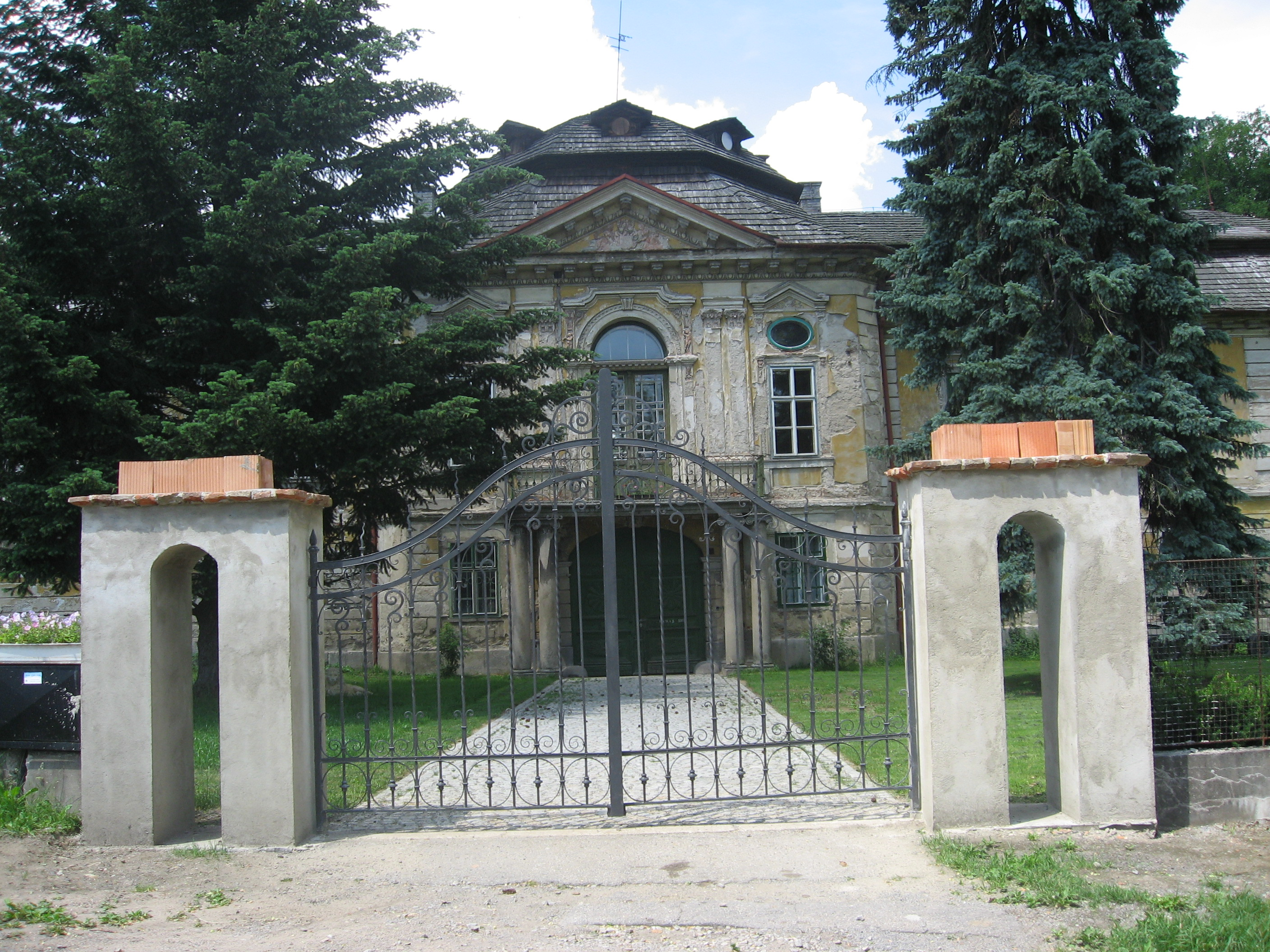 Zámek v Úsobí